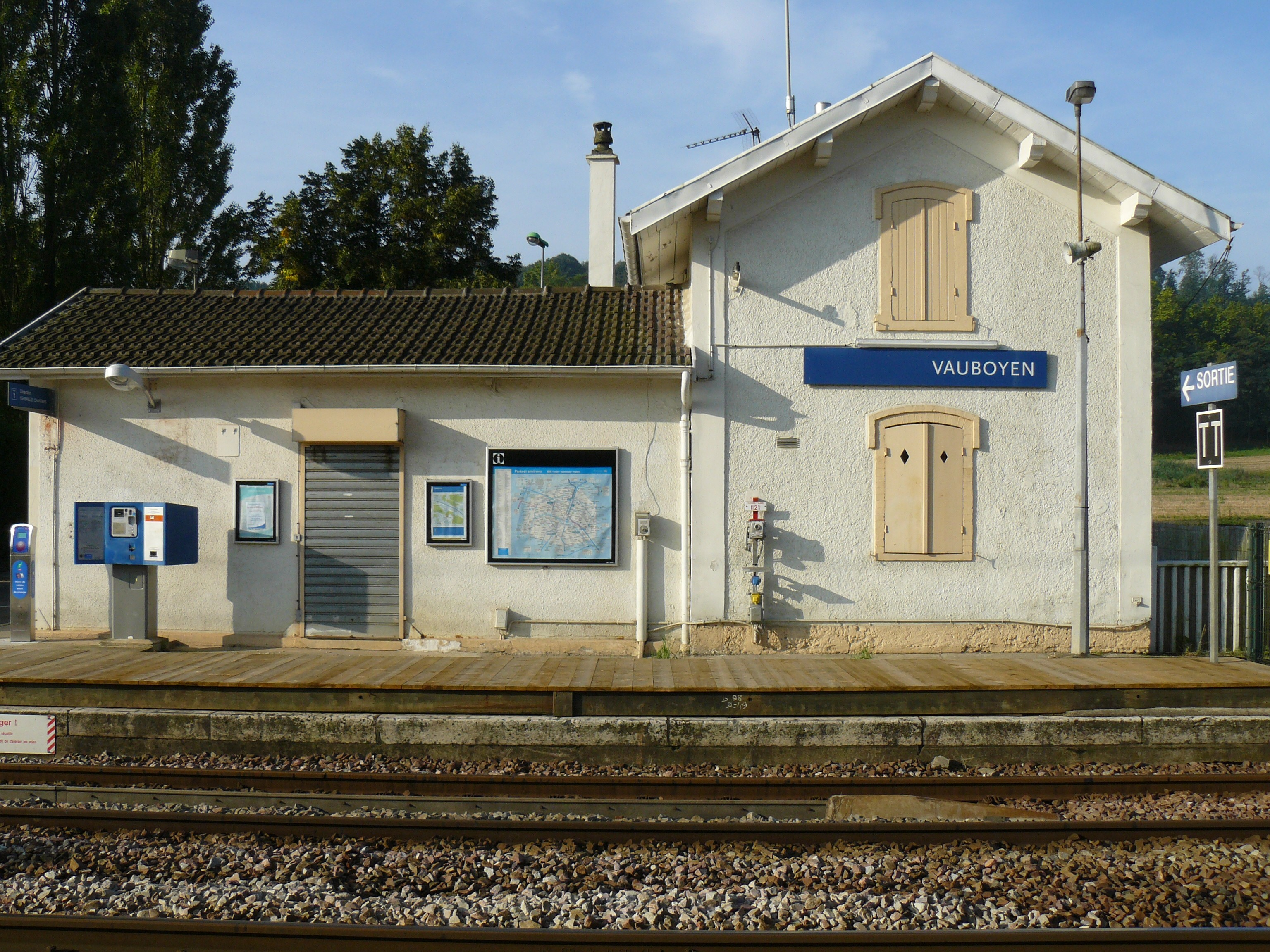 Gare de Vauboyen (Bièvres, Essonne)